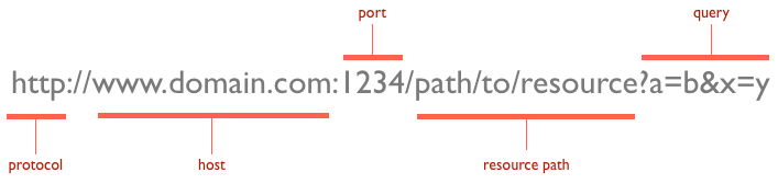 Монгол: zurag3